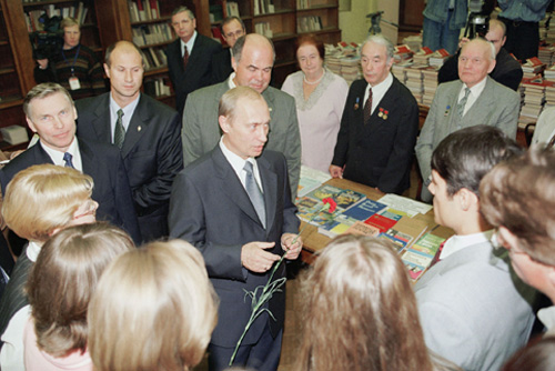 МОСКВА. В библиотеке Московского педагогического государственного университета со студентами и преподавателями.